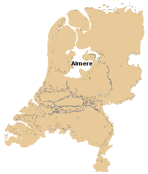 La région des Pays-Bas vers l'an 1300